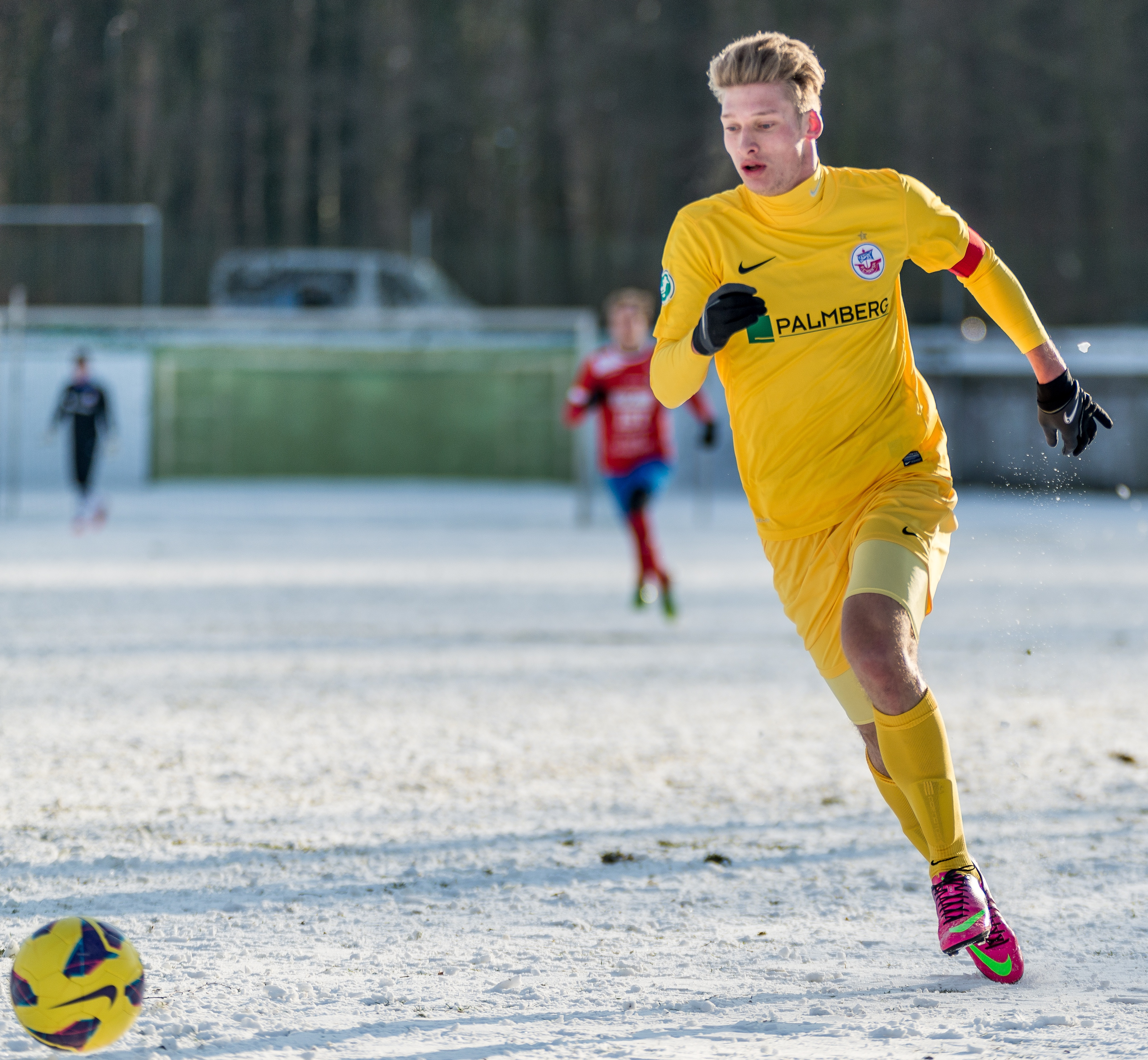 Hansa Rostocks Michael Blum i en träningsmatch mot Östers IF 19/1 2013.